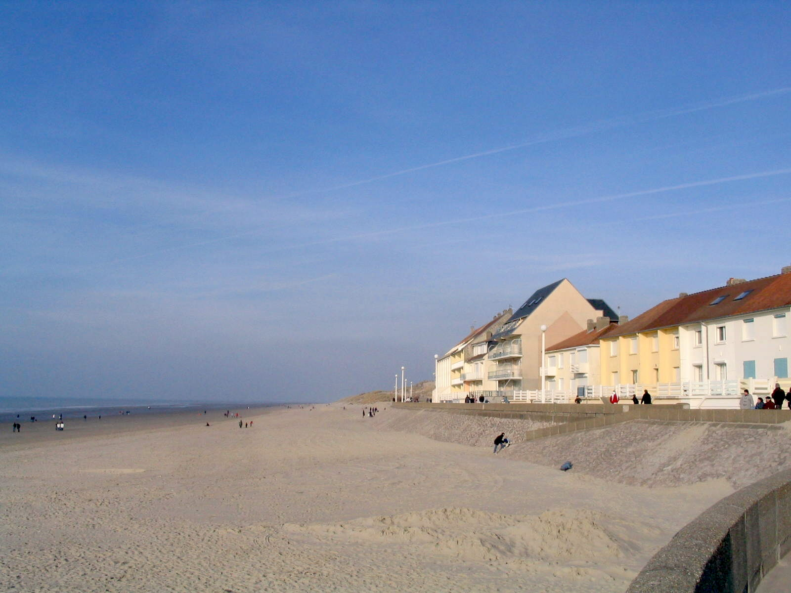 Les étendues de sable de Fort-Mahon-Plage : plage et digue-promenade en front de mer.